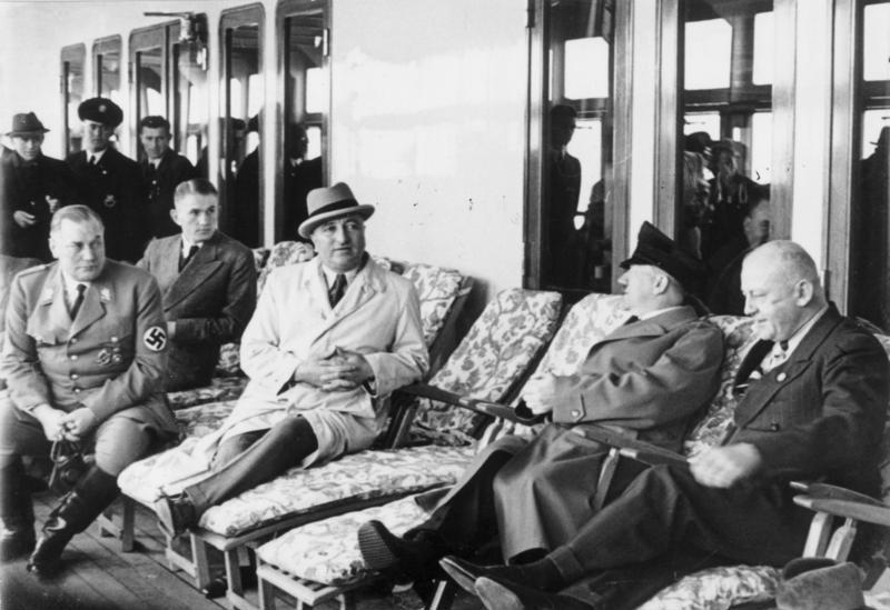 Adolf Hitler an Bord des "Robert Ley" Unser Bild von der Jungfernfahrt des KdF Flaggschiffes "Robert Ley" mit Adolf Hitler inmitten seiner Arbeiterurlauber an Bord zeigt von rechts Gauleiter Adolf Wagner, Adolf Hitler, Dr. Ley und den Chefadjutanten A. Hitlers, SA Obergruppenführer Brückner, auf den Liegestühlen auf dem Promenadendeck. 4.4.1939 AV 54 623